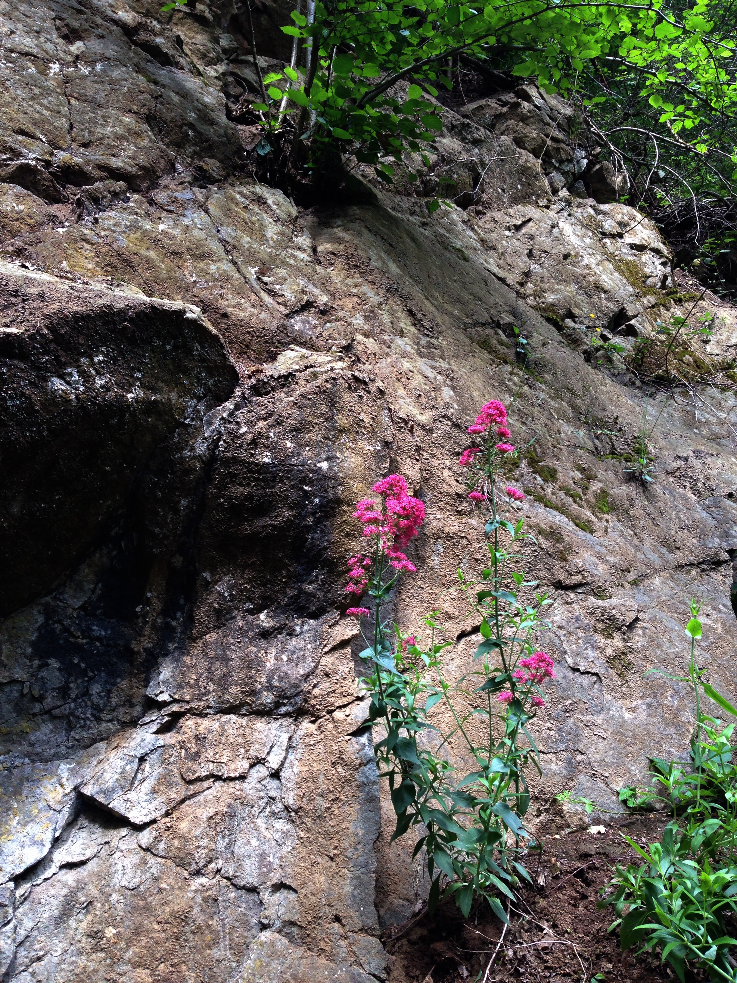 Hauptverbreitungsgebiet in den Mittelmeerländern. Sehr wärmeliebend, wild eine Besonderheit am Rande des Westerwaldes.